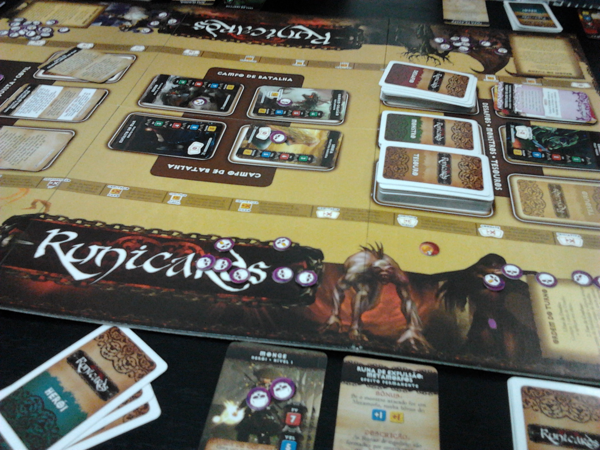 Runicards - Batalha pela Terra do Fogo